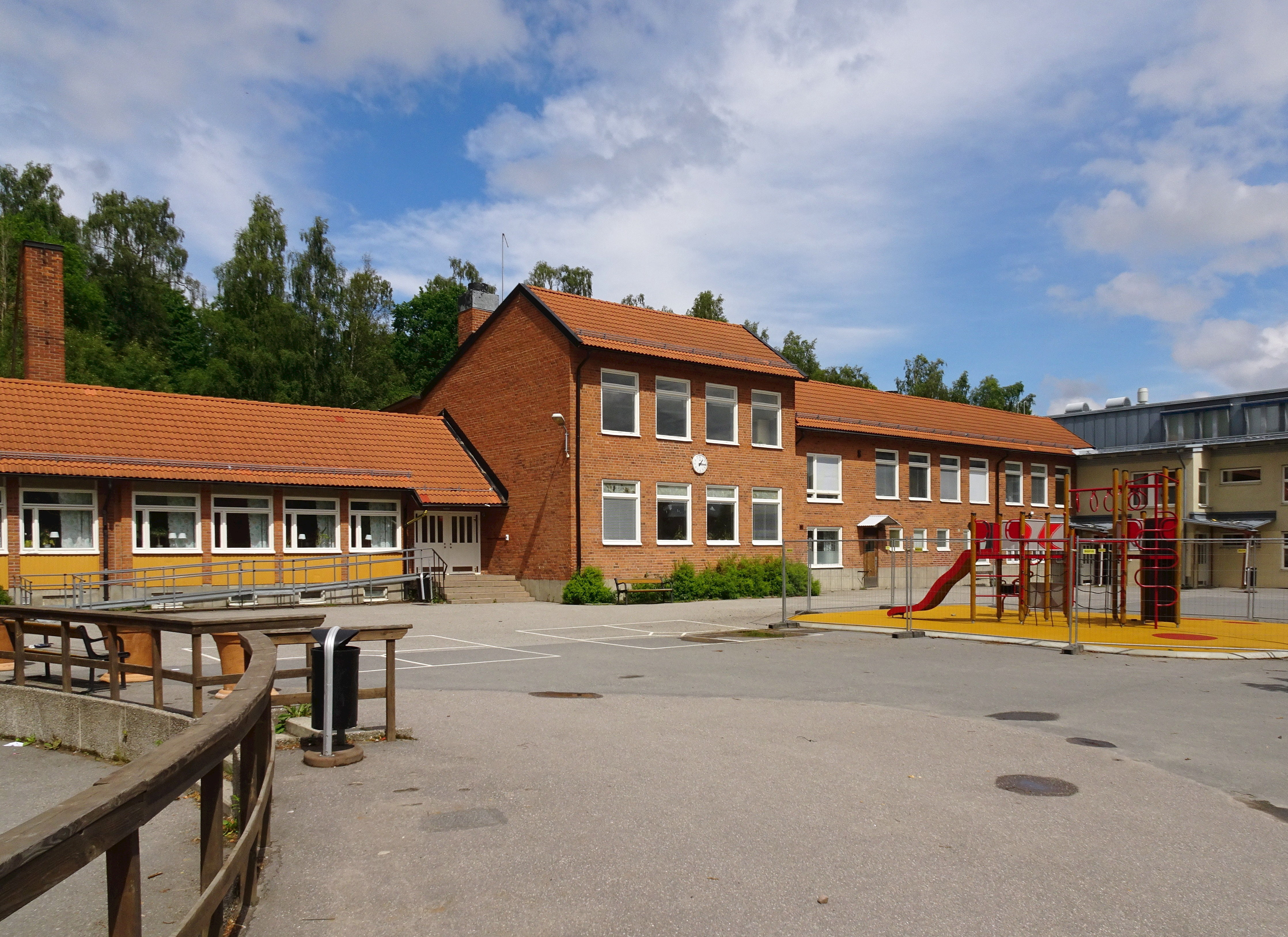 Vistaskolan i Vistaberg (gamla delen), arkitekt Karl W. Ottesen